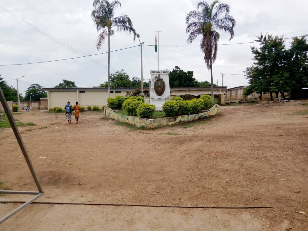 entrée